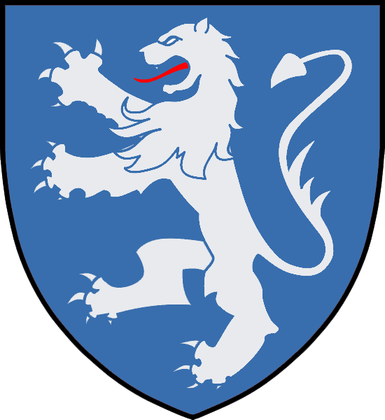 Vapensköld för norsk-danska adelsätten Løvenskiold